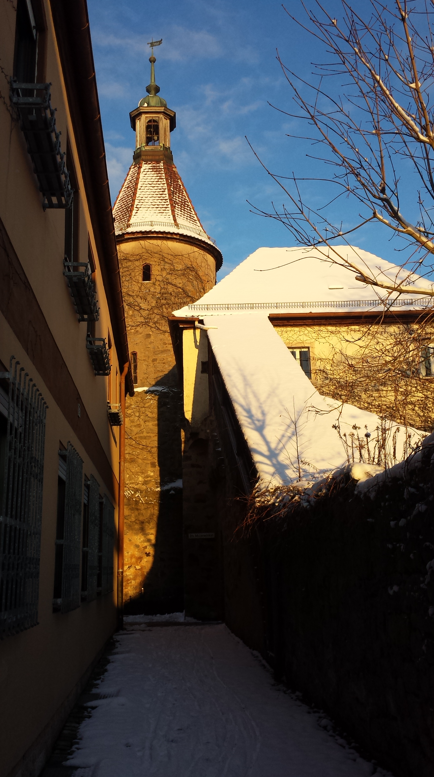 Der sogenannte Malerwinkel in Leutershausen mit Blick auf den Unteren Turm